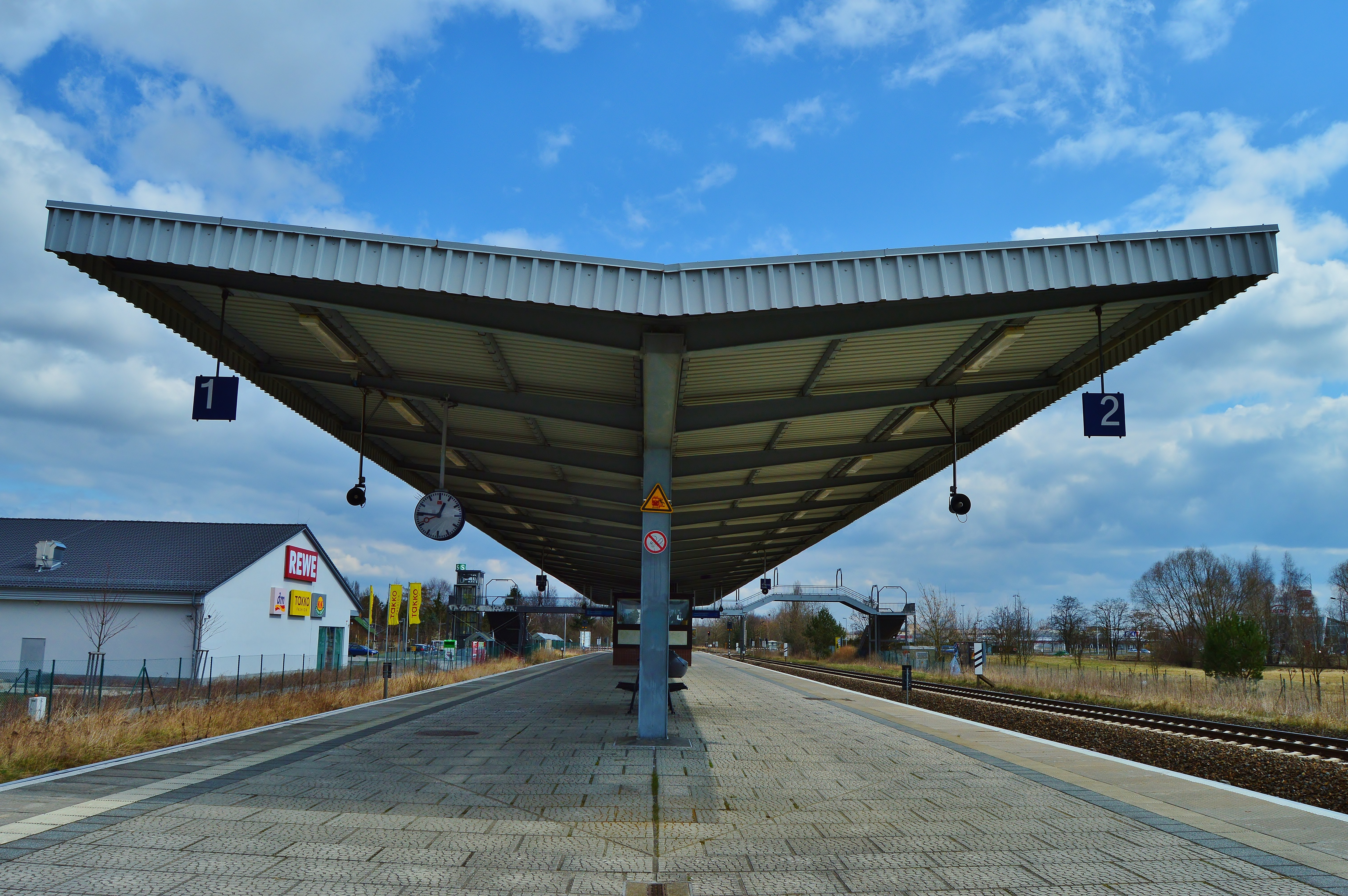 Bahnsteig des S-Bahnhof Birkenstein, Landkreis Märkisch-Oderland